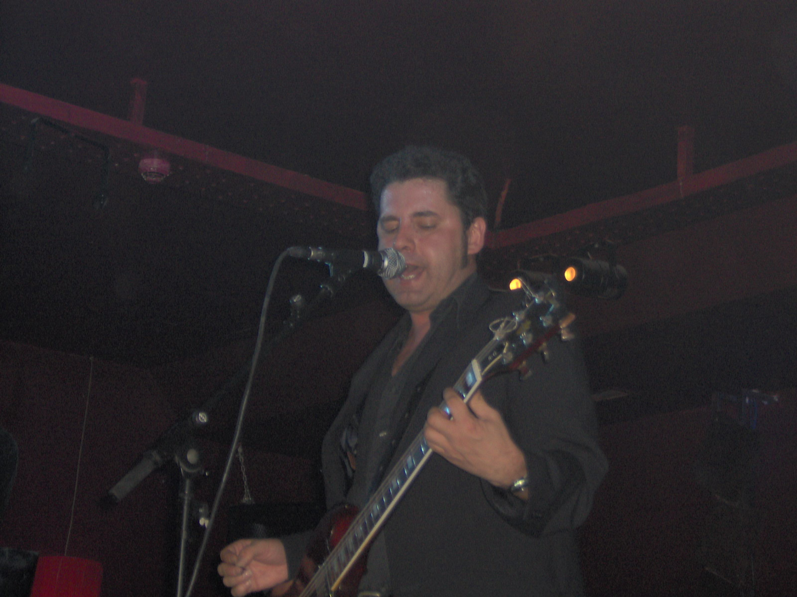 José Ignacio Lapido en un concierto homenaje a 091 en la discoteca Bariloche (Jaén).